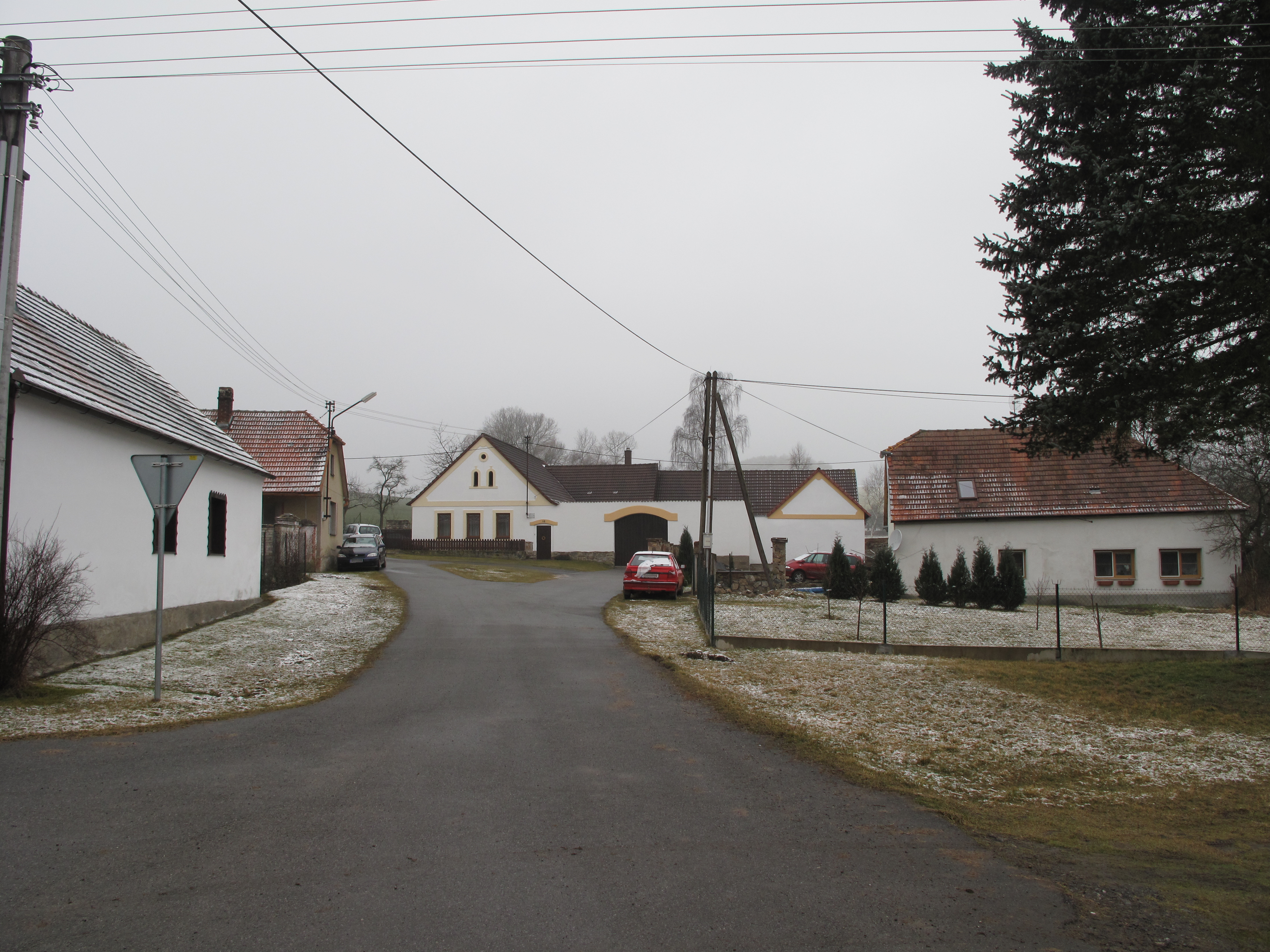 Náves v Kakovicích. Okres Strakonice, Česká republika.